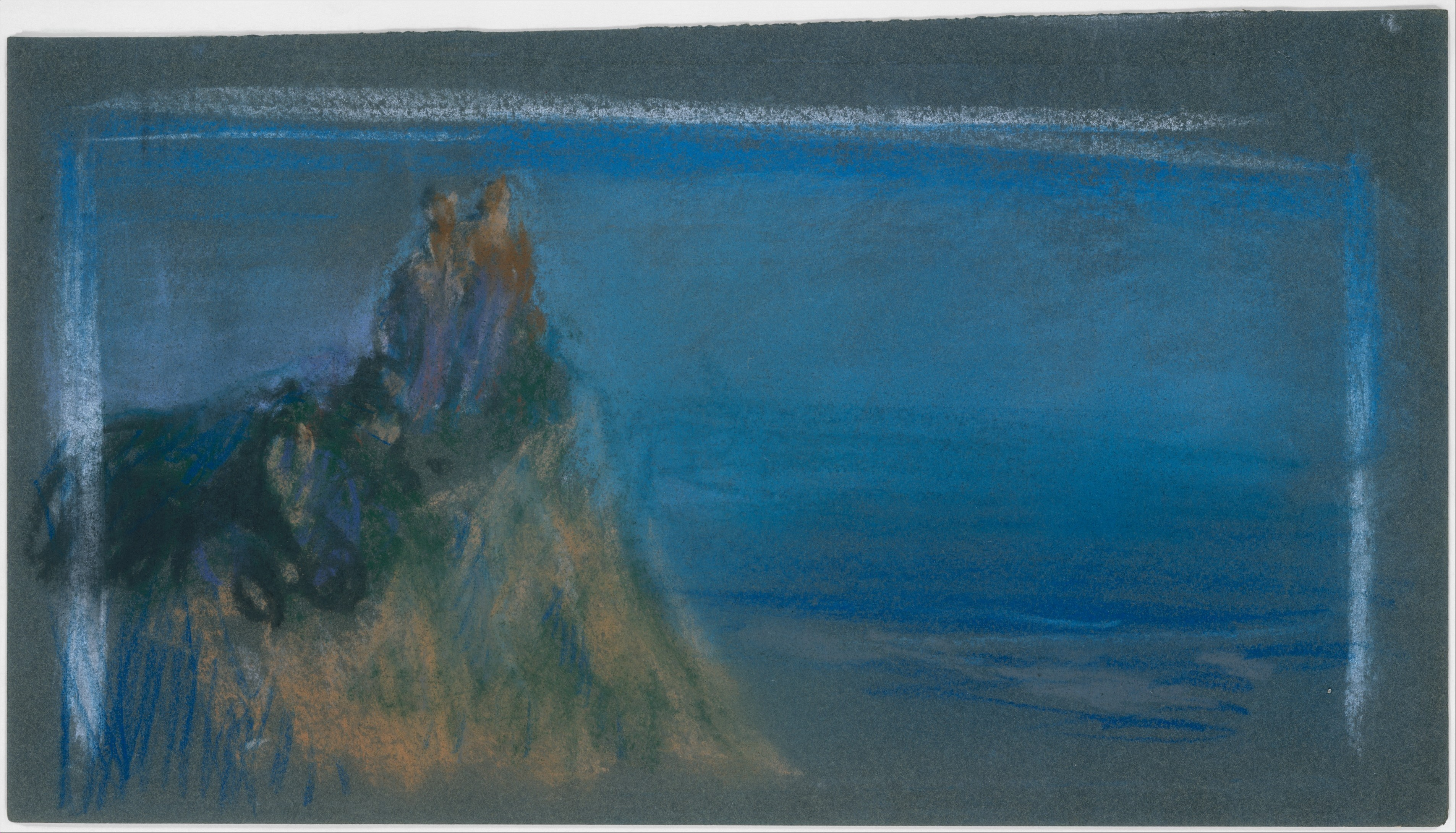 Drawing; Drawings